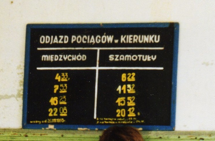 Rozkład jazdy na stacji kolejowej w Szczepankowie.